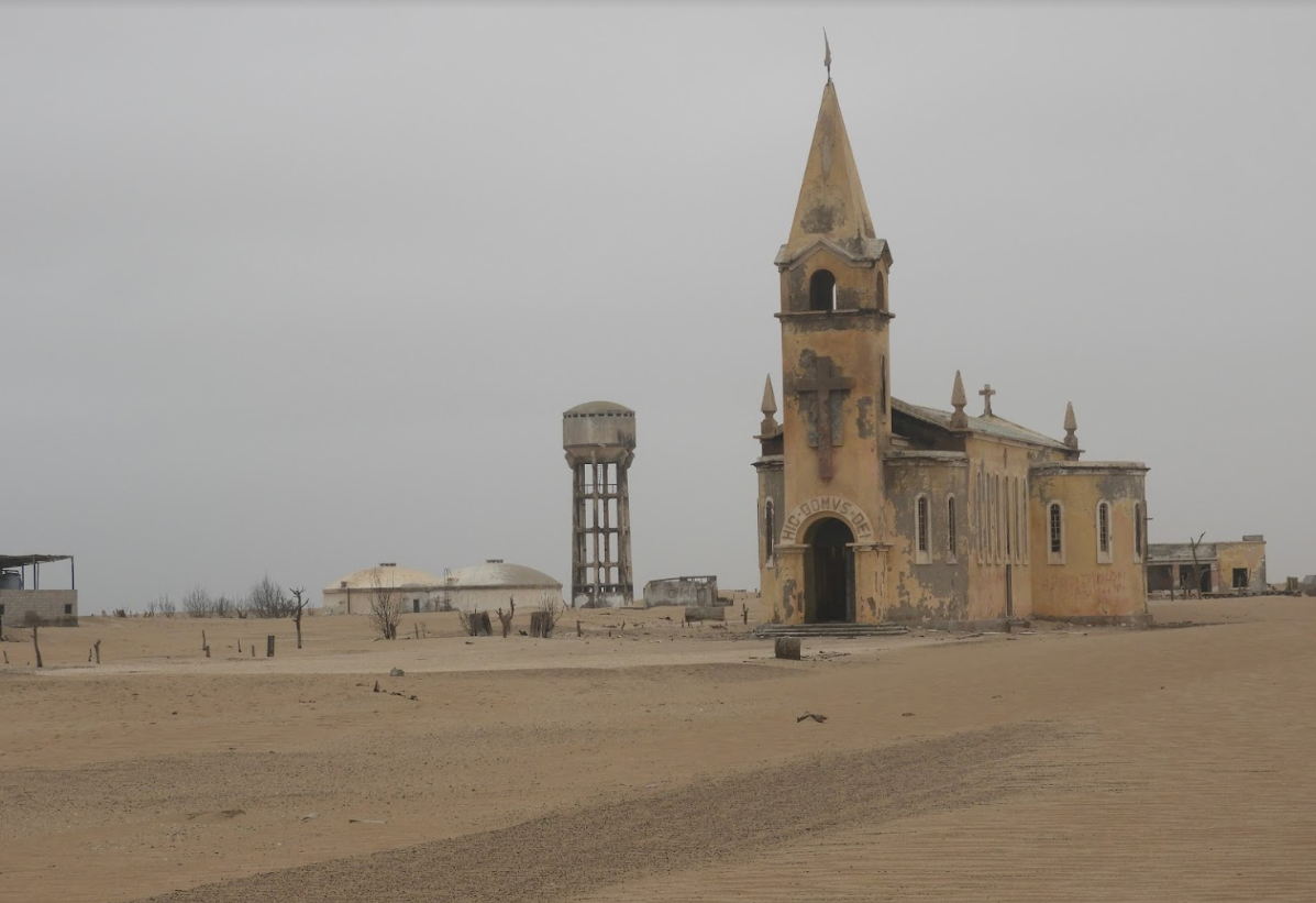 Capela da povoação abandonada